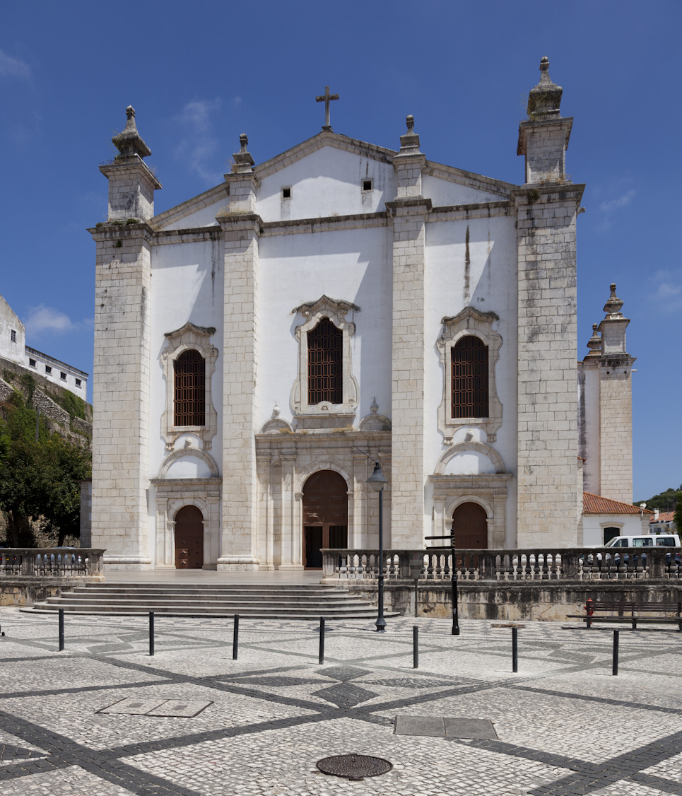 Sé de Leiria